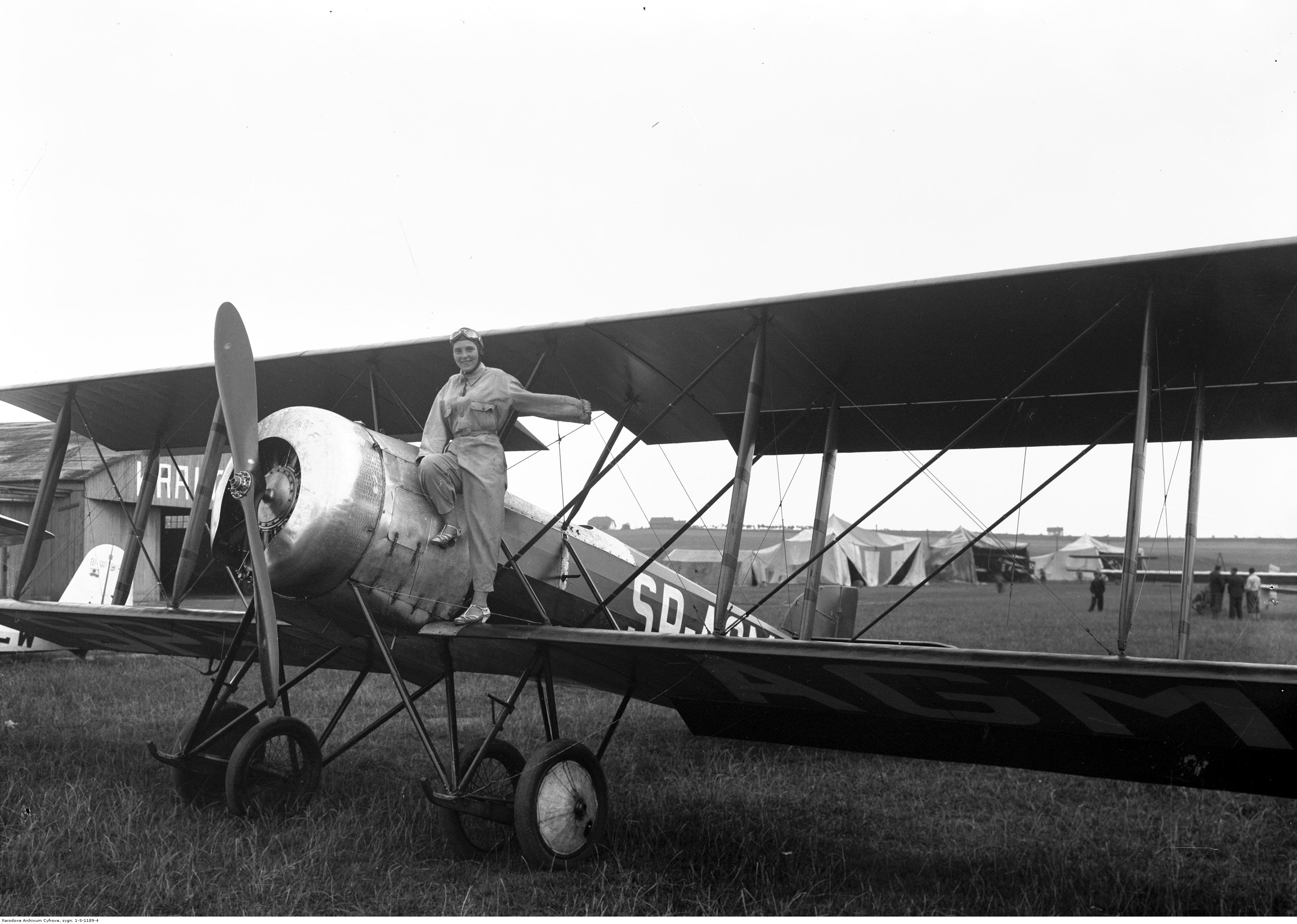 Samolot Hanriot H.28, na skrzydle stoi Jadwiga Pitulanka